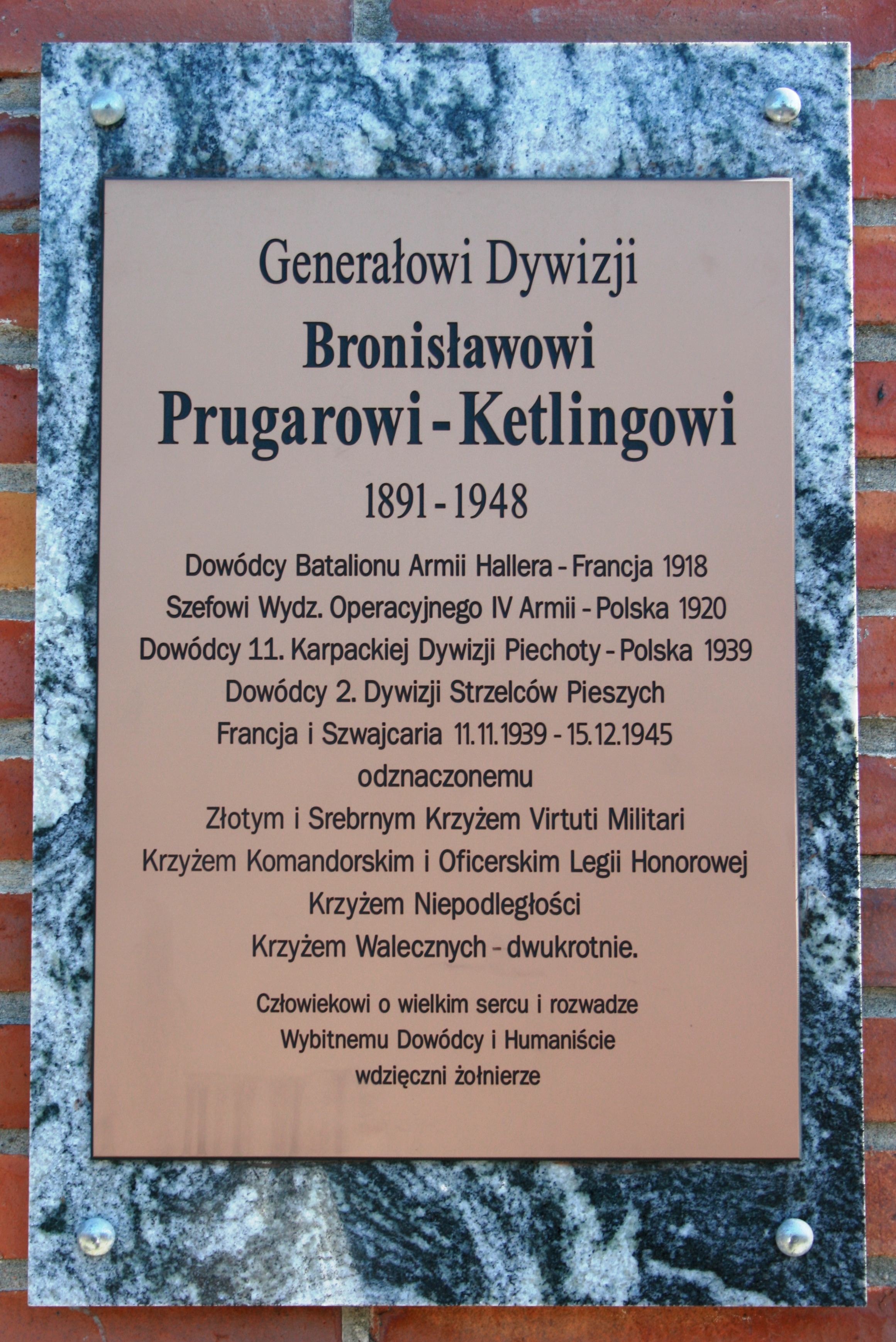 Kwatera Pierwszej Samodzielnej Brygady Spadochronowej na Powązkach Wojskowych w Warszawie